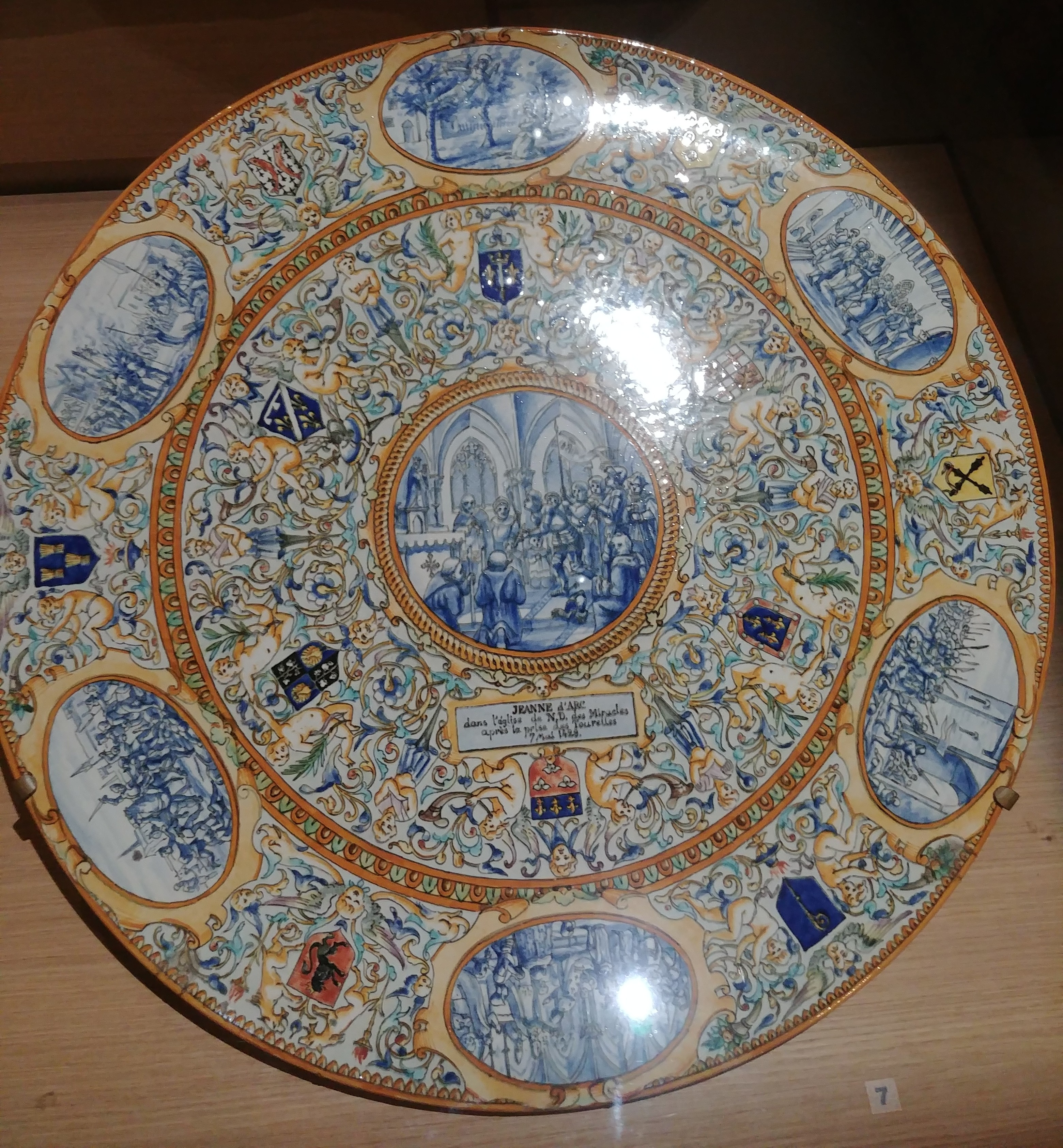 adrien thibault assiette jeanne d'arc